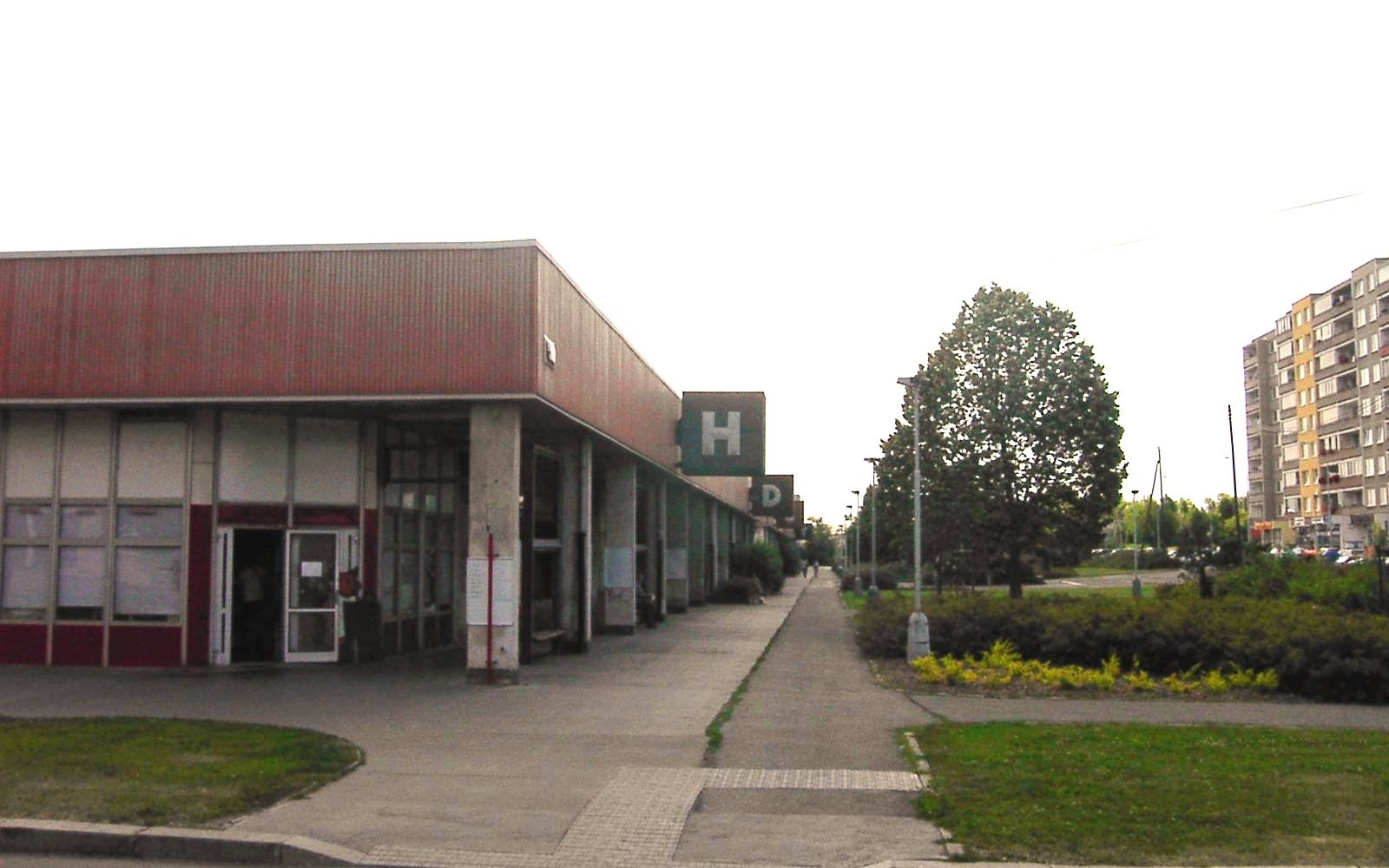 Česky: Šostakovičovo náměstí s obchodním střediskem ve Stodůlkách.